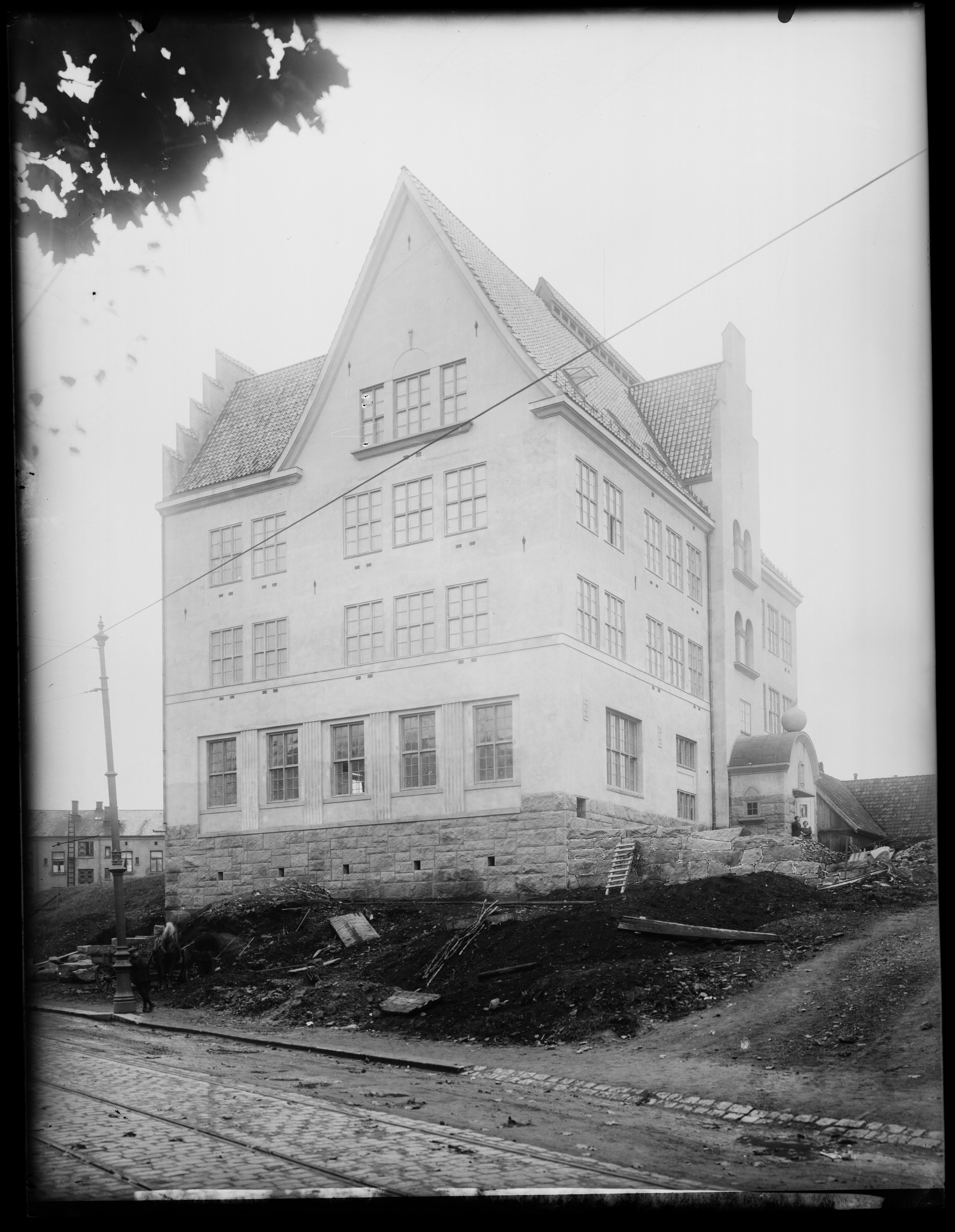 Bildet er hentet fra Nasjonalbibliotekets bildesamling. Anmerkninger til bildet var: Påskrift arkivark: Kristelige gymnasium 1916. Eldste arkivnummer: 351 Bislett,Oslo, Oslo, Oslo Kristelig gymnasiums historie (1963): Kristelig Gymnasium starta undervisninga høsten 1913 i en bygning skolen hadde kjøpt i Oscars gate nr. 20. I 1916 flytta virksomheten til et nyreist skolebygg i Josefines gate nr. 8.